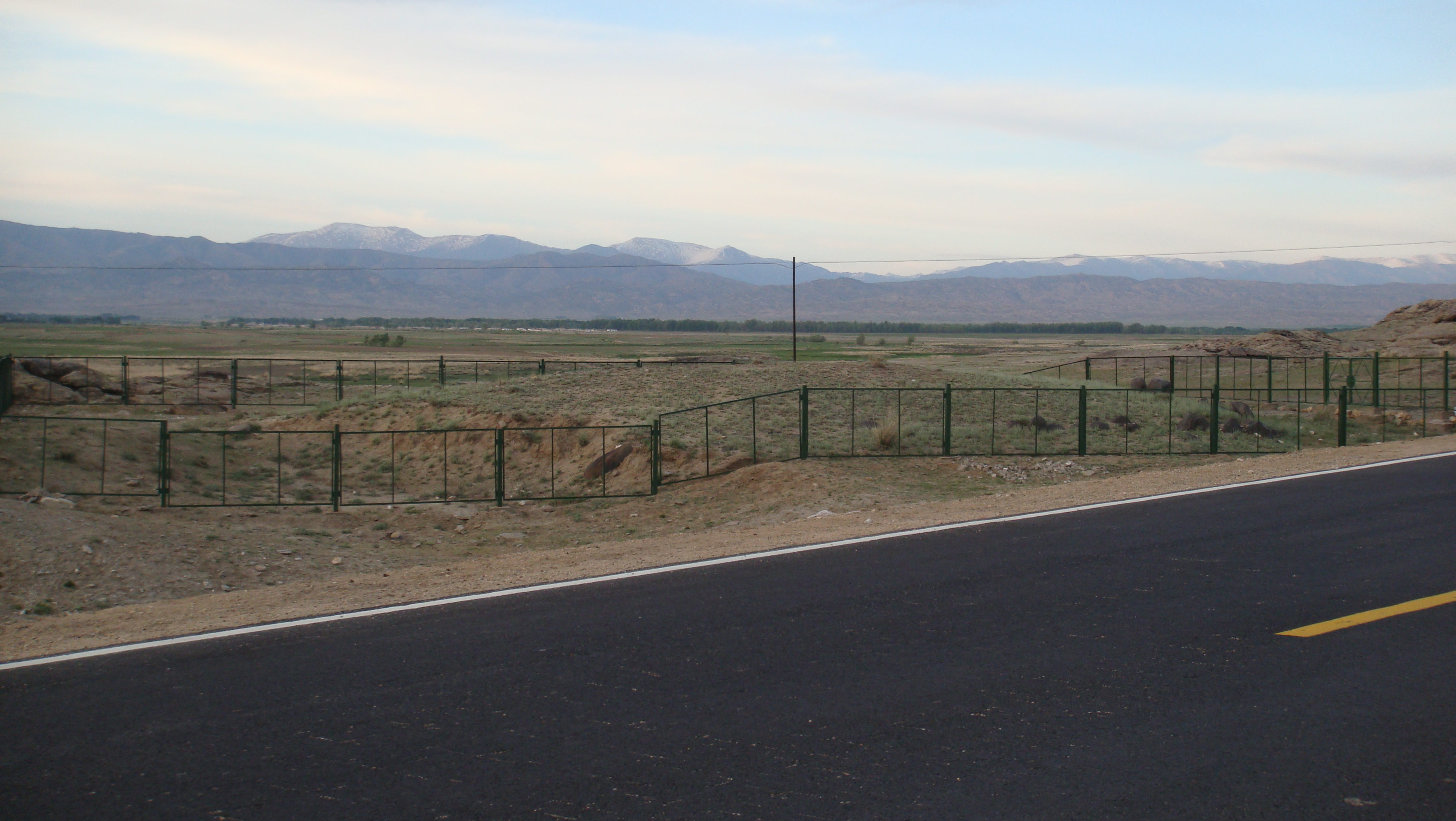 国道217 21公里的切木尔切克乡的古墓群 余华峰